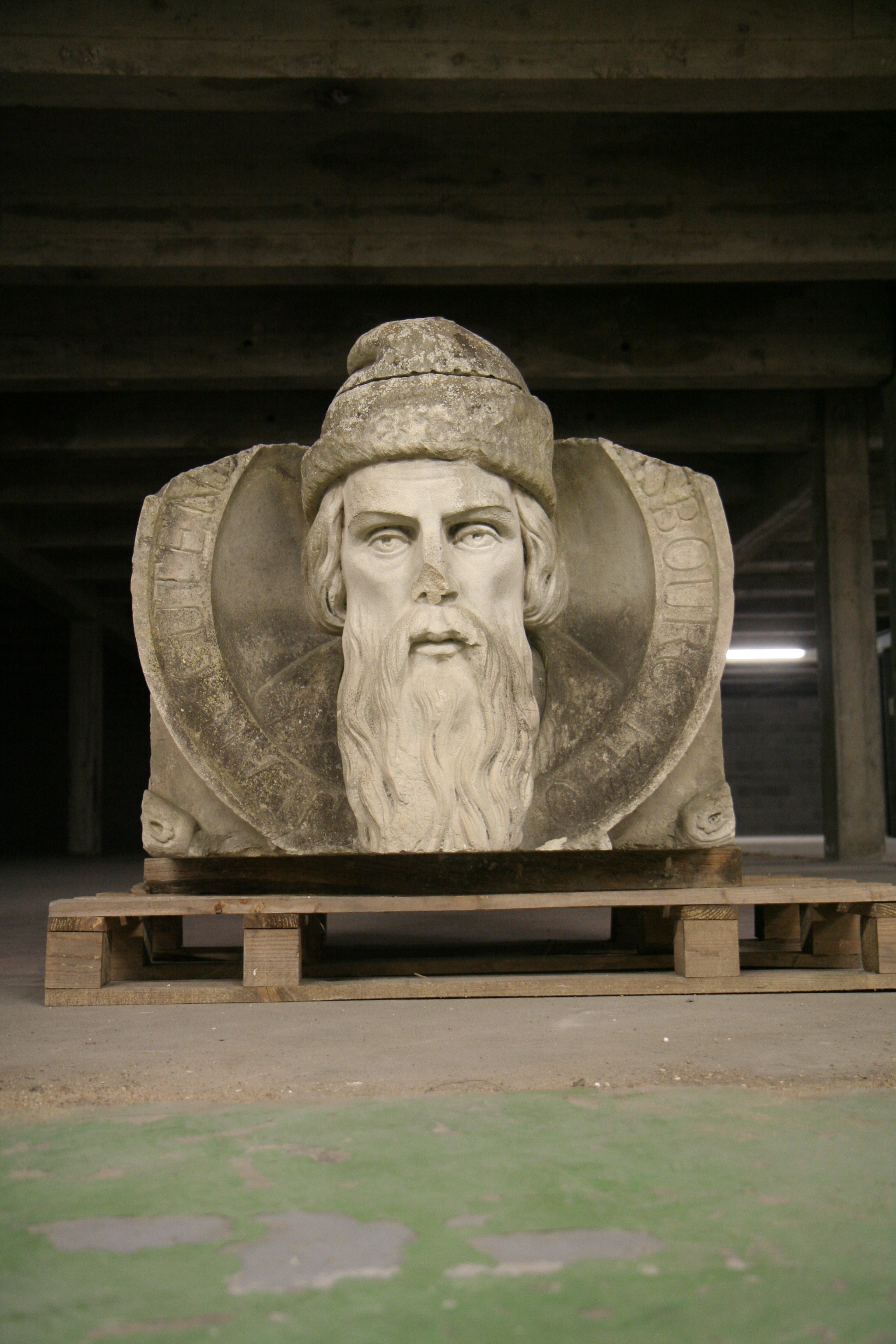 Sculpture de Gutenberg exposée auparavant devant l'usine MAME.